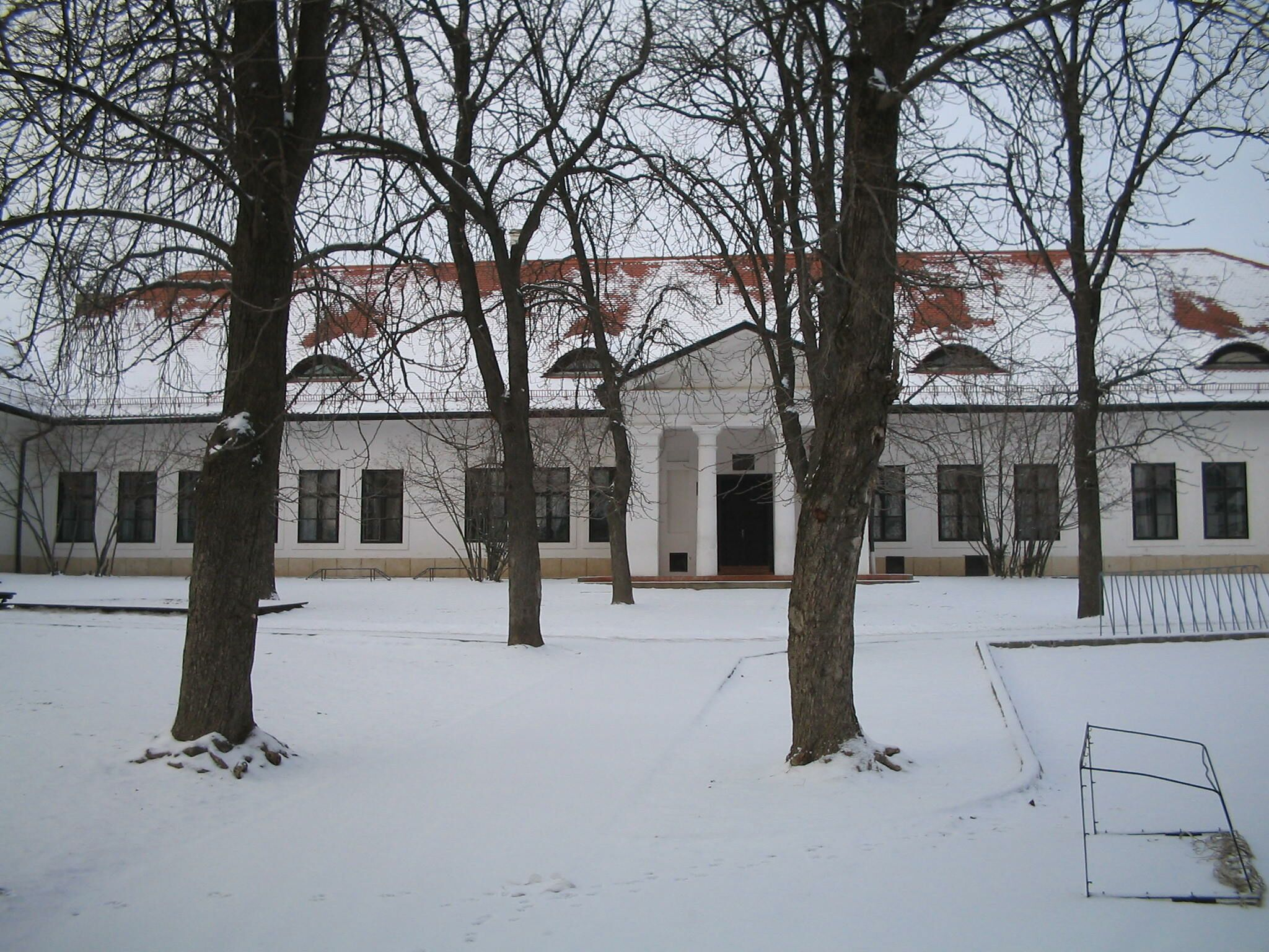 Kornis kúria, Paks